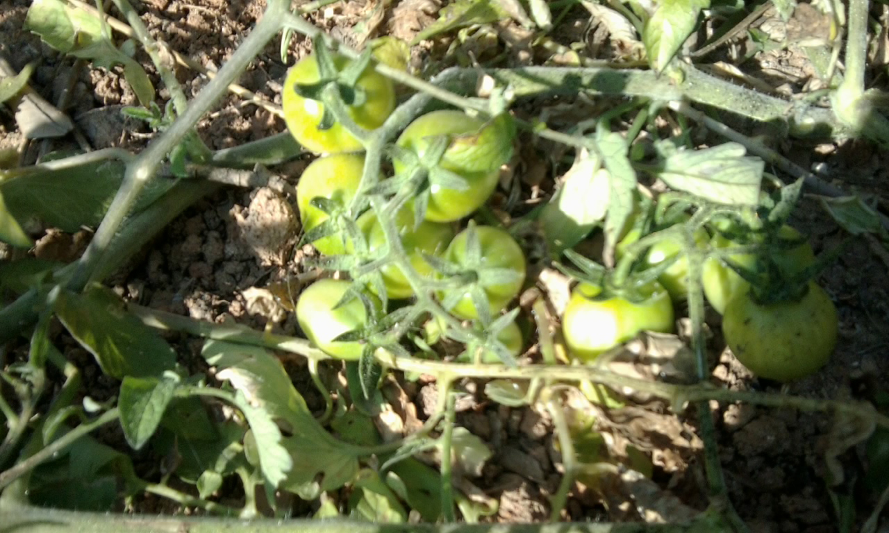 नेपाली: गोलभेडाको बोट